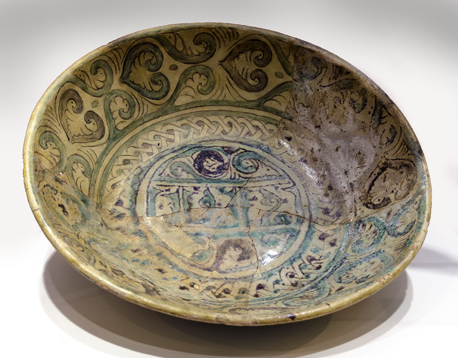 Se encontró en la Plaza Belén de Jerez y está datado en el siglo X.